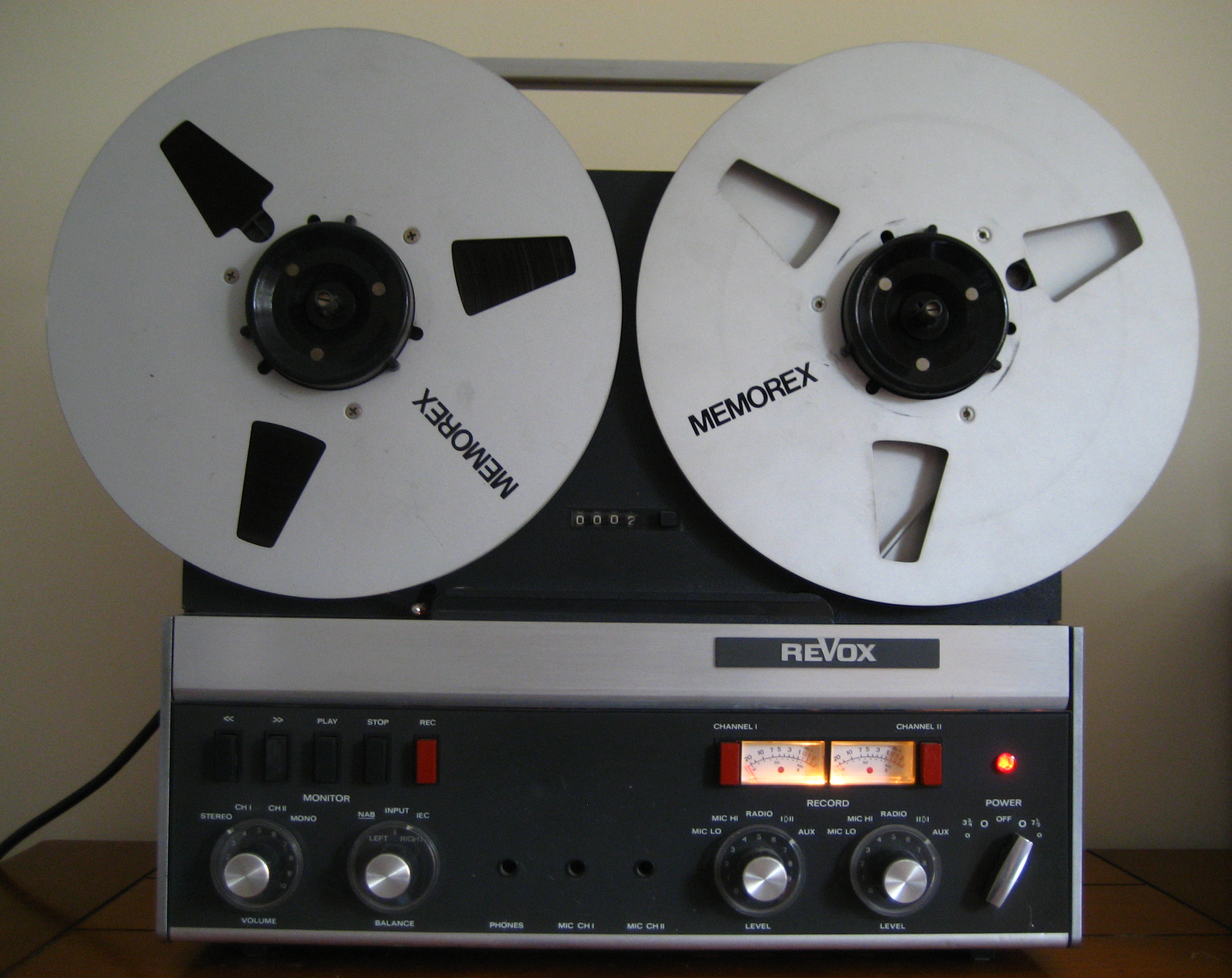 Revox A77 tape recorder